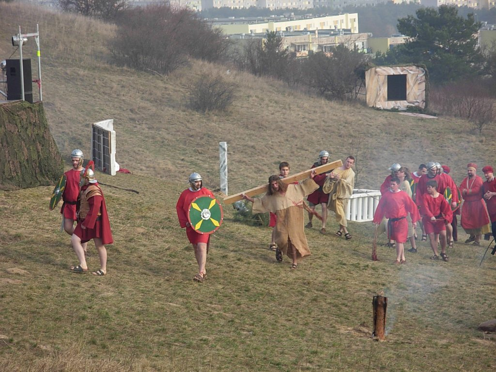 Misterium Męki Pańskiej w Dolinie Śmierci 2009 r.